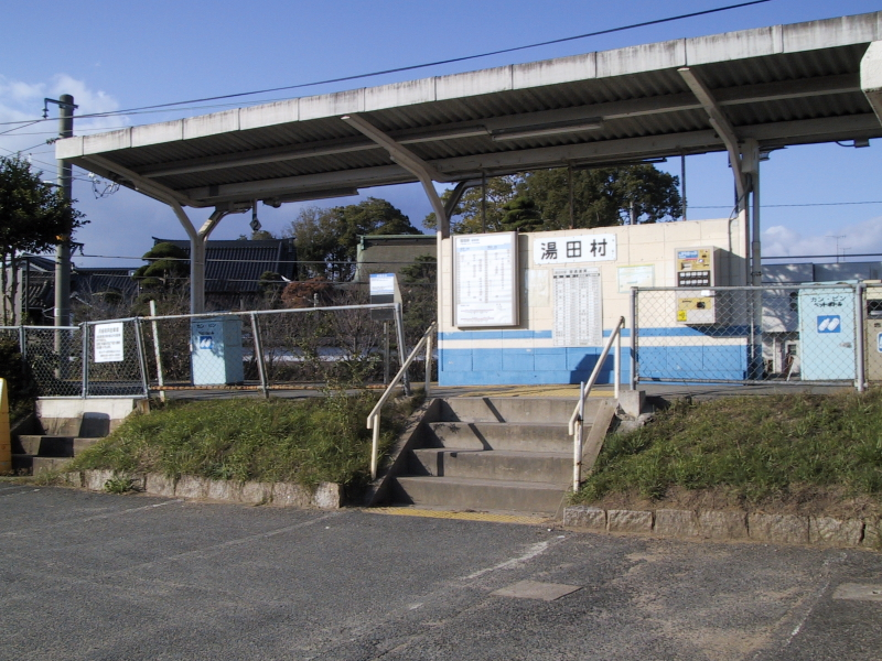 湯田村駅、投稿者撮影